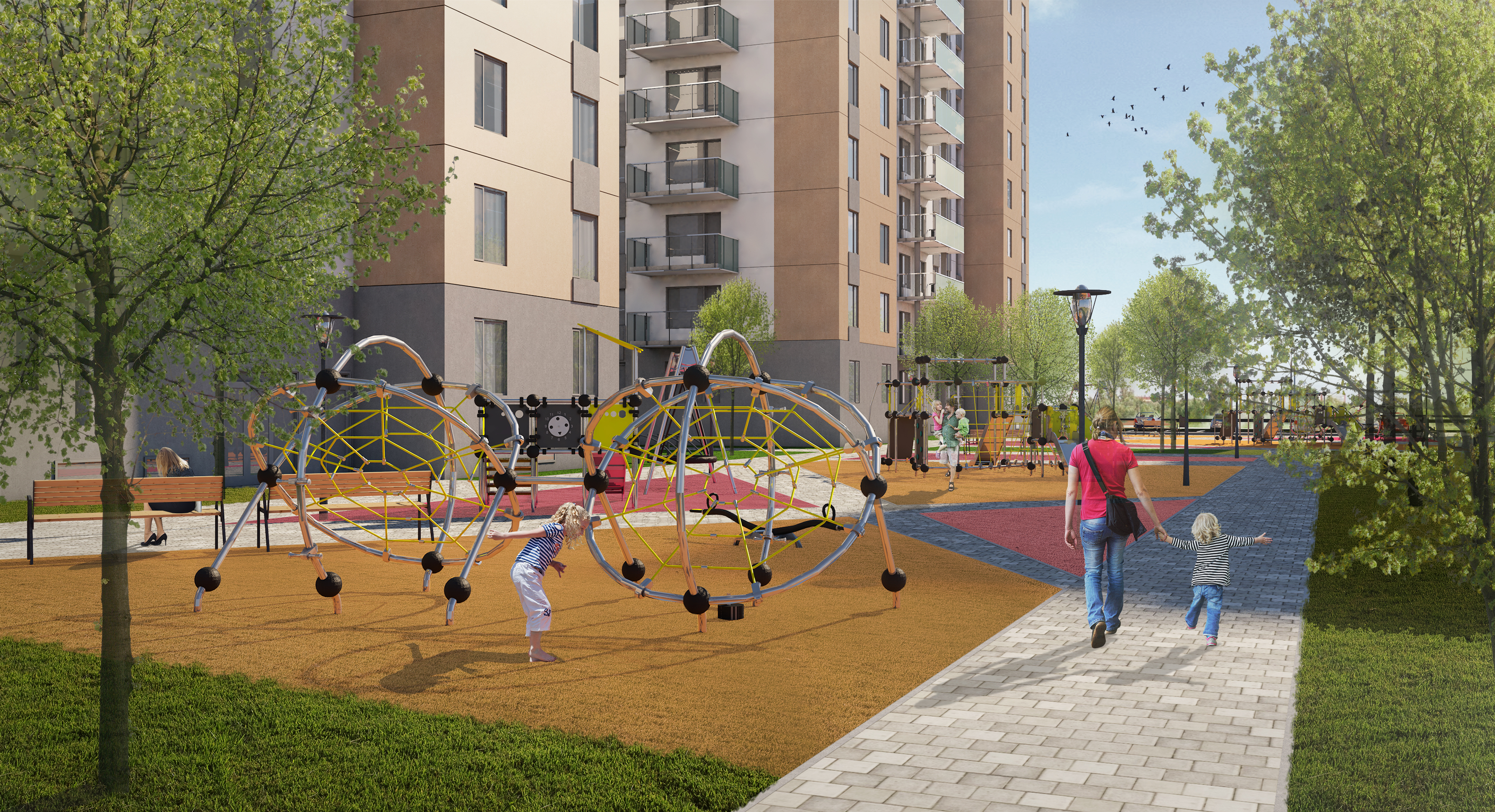 KBO Lapeņu iela 4